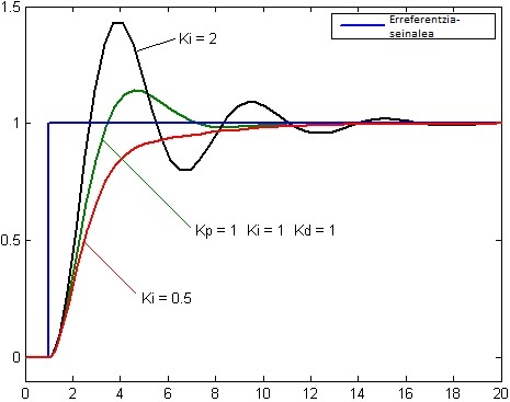 Integrala